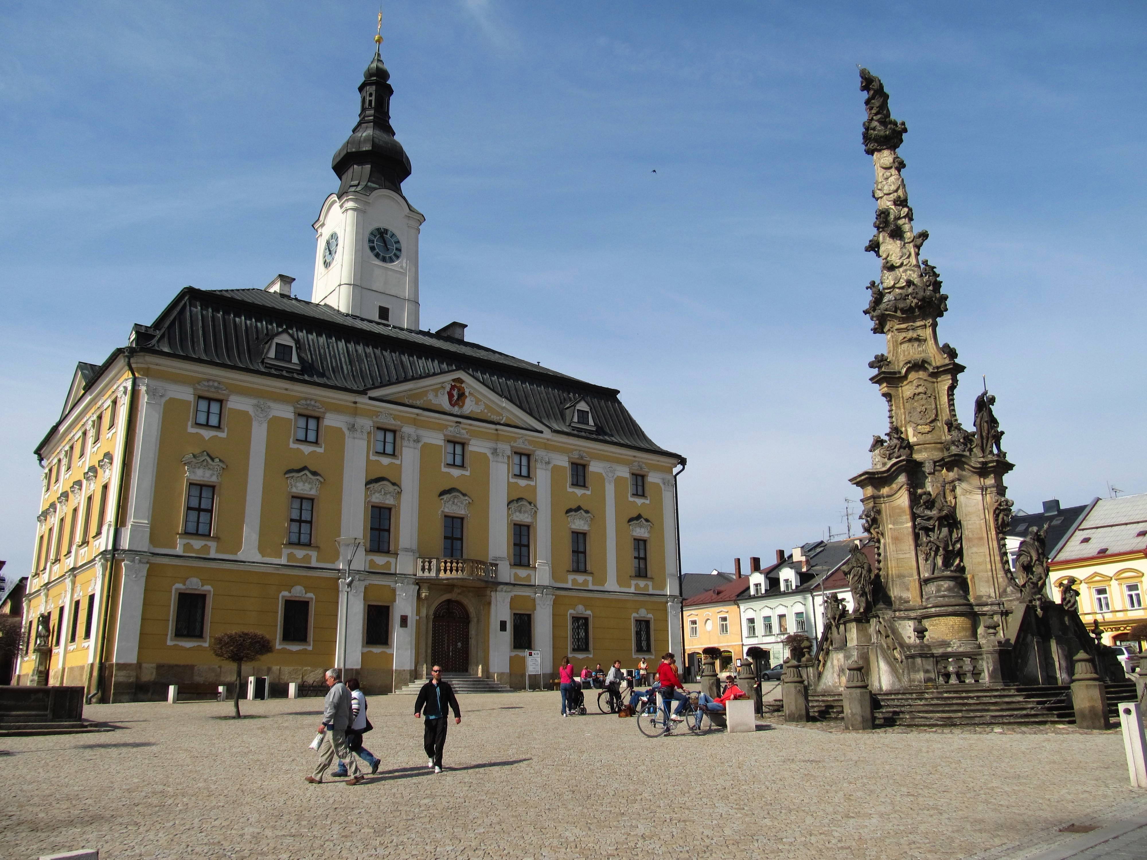 Palackého náměstí s radnicí a mariánským sloupem